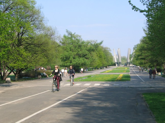 Aleja ks. Józefa Stanka w Parku Marszałka Edwarda Rydza-Śmigłego na Powiślu w Warszawie